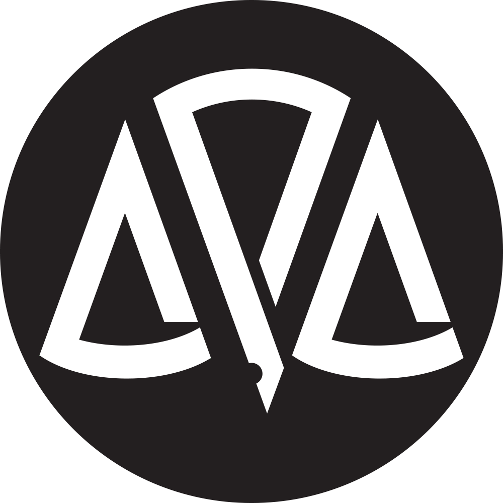 Знакът на съда е създаден безвъзмездно от Веселин Пенчев през 2013 г., член на Съюза на българските художници, автор на над 50 запазени марки, най-известните от които са на: Българска федерация по тенис, Химикотехнологичен и металургичен университет, "Геотехмин" ООД, "ЦКБ" АД. Представлява стилизирано изображение на абревиатурата на Софийския районен съд, съдържащо везна, писец и меч, като символи на справедливостта, словото и принудителната сила на държавата, с която правото бива налагано при необходимост.